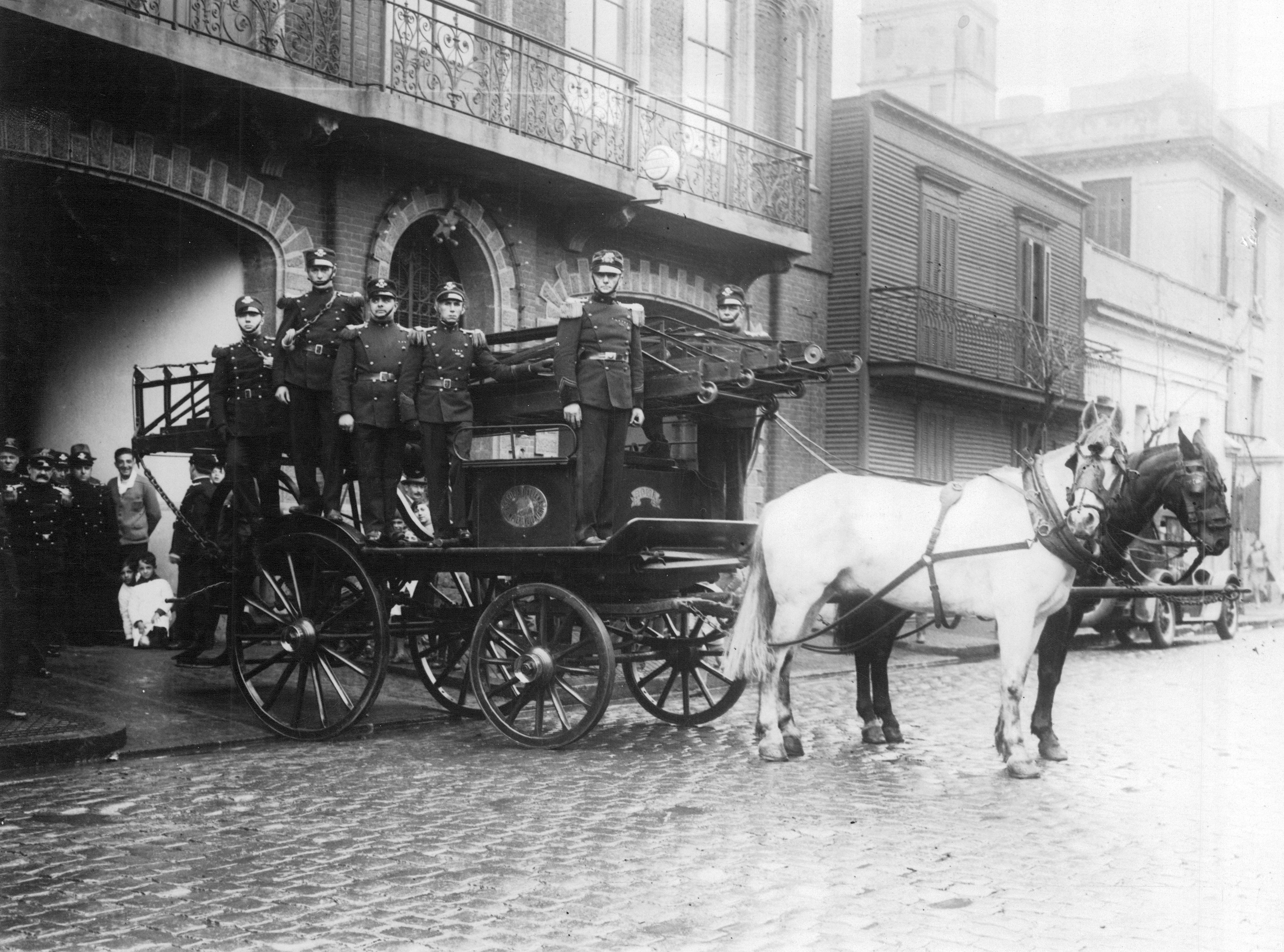 Bomberos voluntarios de La Boca, c.1900. Inventario 18782.